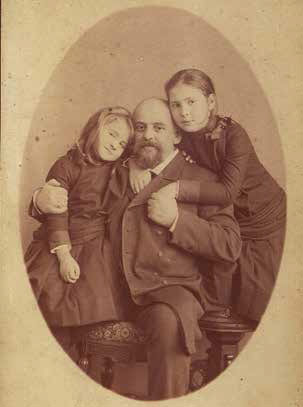 С. И. Мамонтов с дочерьми Александрой и Верой (справа). 1884. Фотография. Собрание С. Н. Чернышева